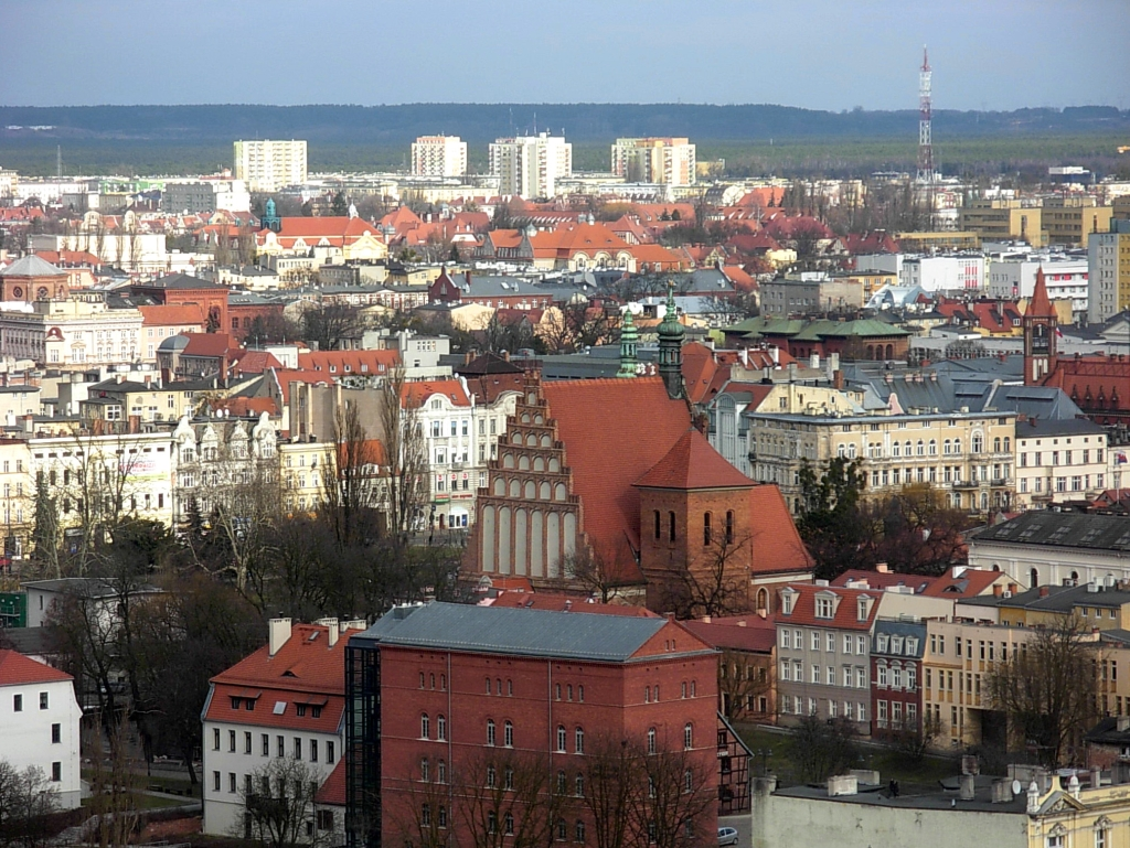 Widok centrum Bydgoszczy z wieży ciśnień na os. Szwederowo